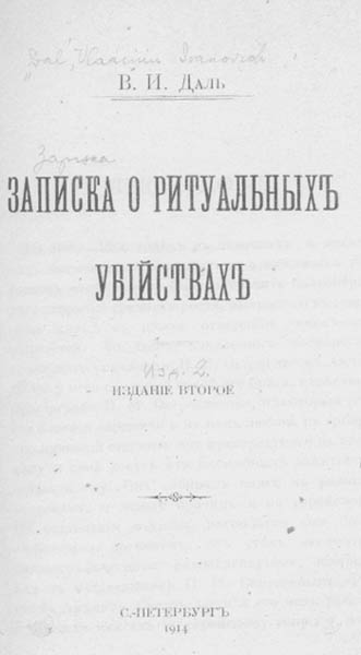 "Записка о ритуальных убийствах", второе издание, 1914